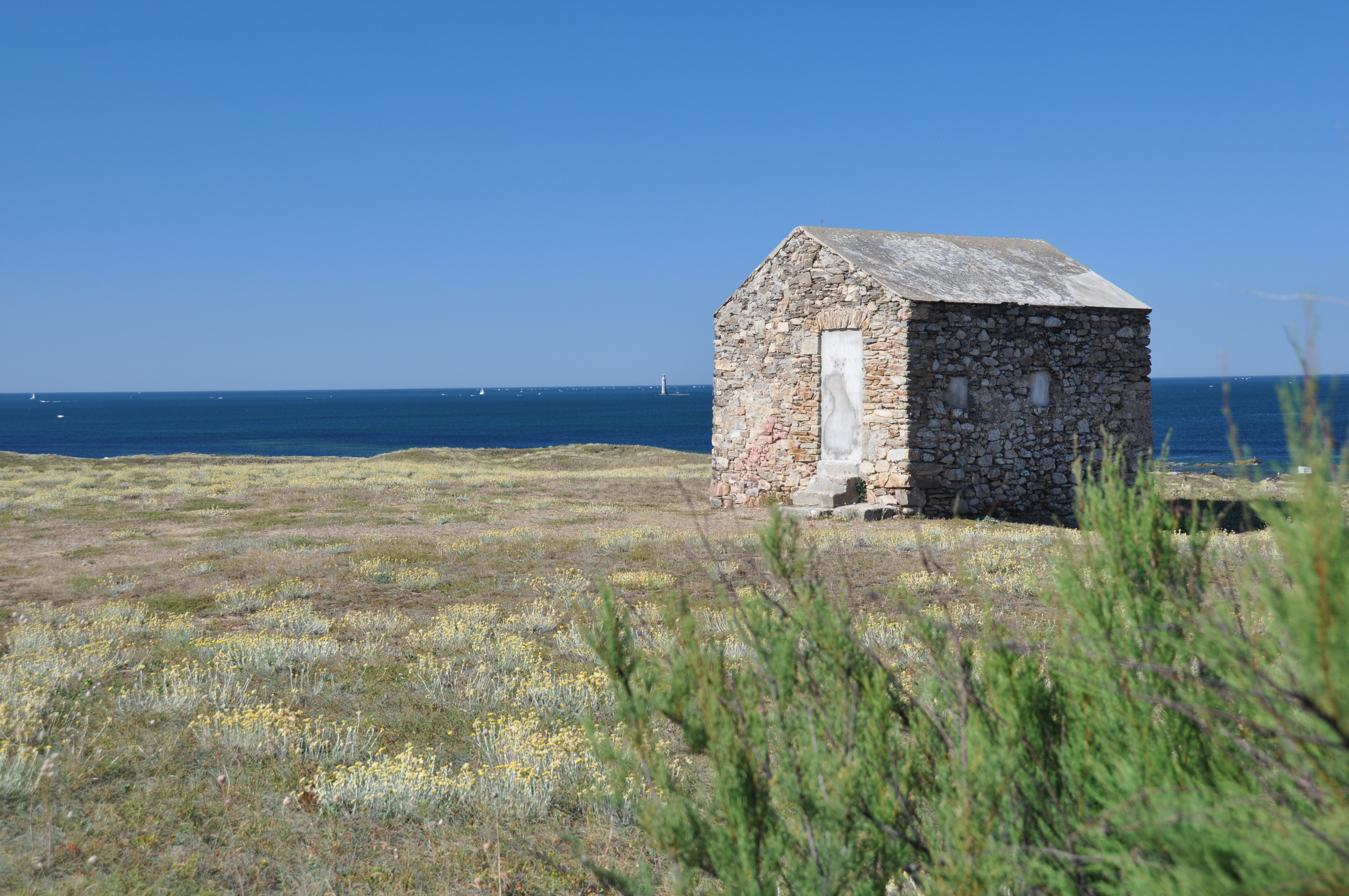 Ancien bâtiment dit le Corps de garde de garde de l'Aubraie, hameau de l'Aubraie, commune des Sables d'Olonne, Vendée (France)